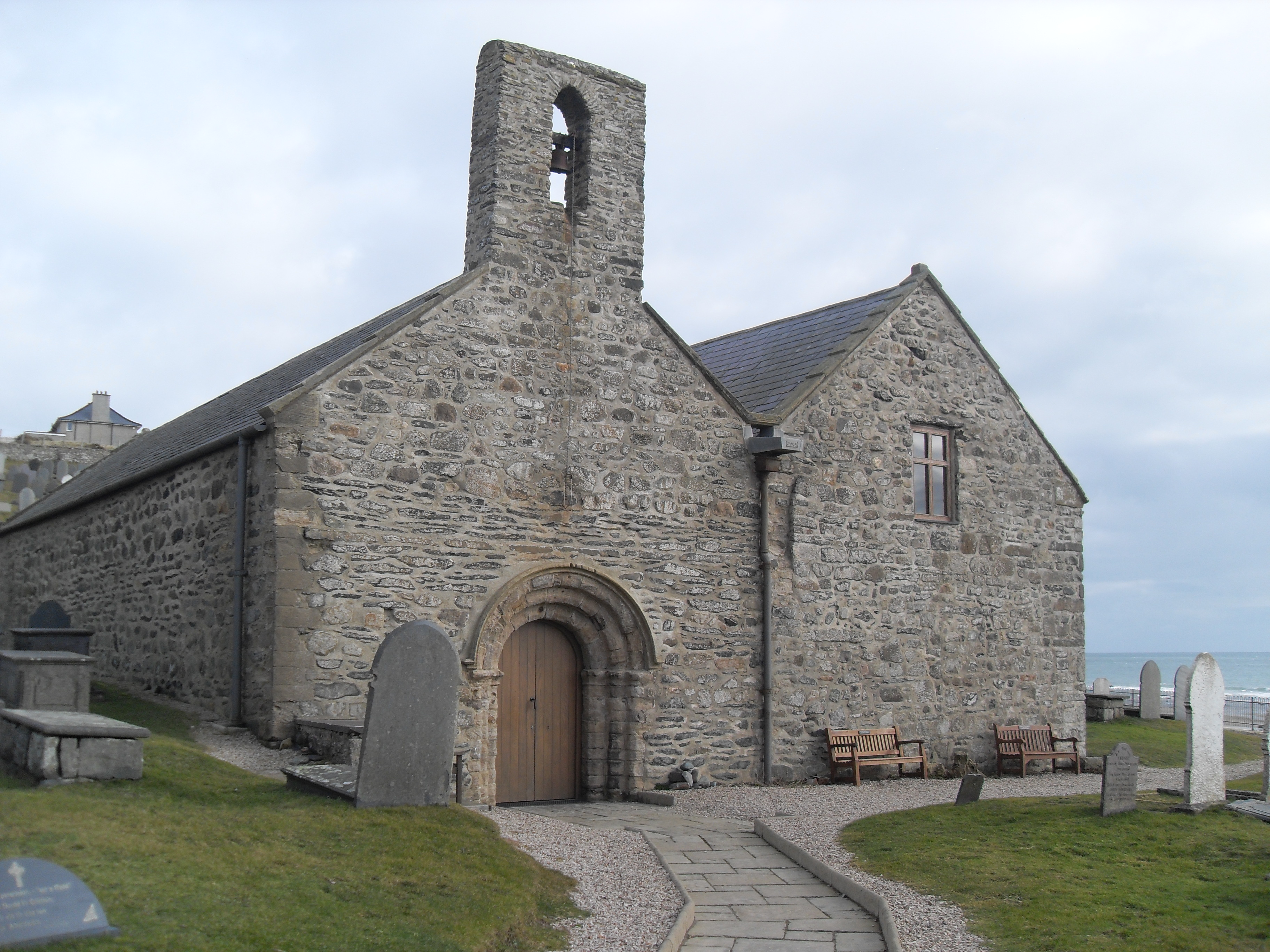 St Hywyn's Church at Aberdaron